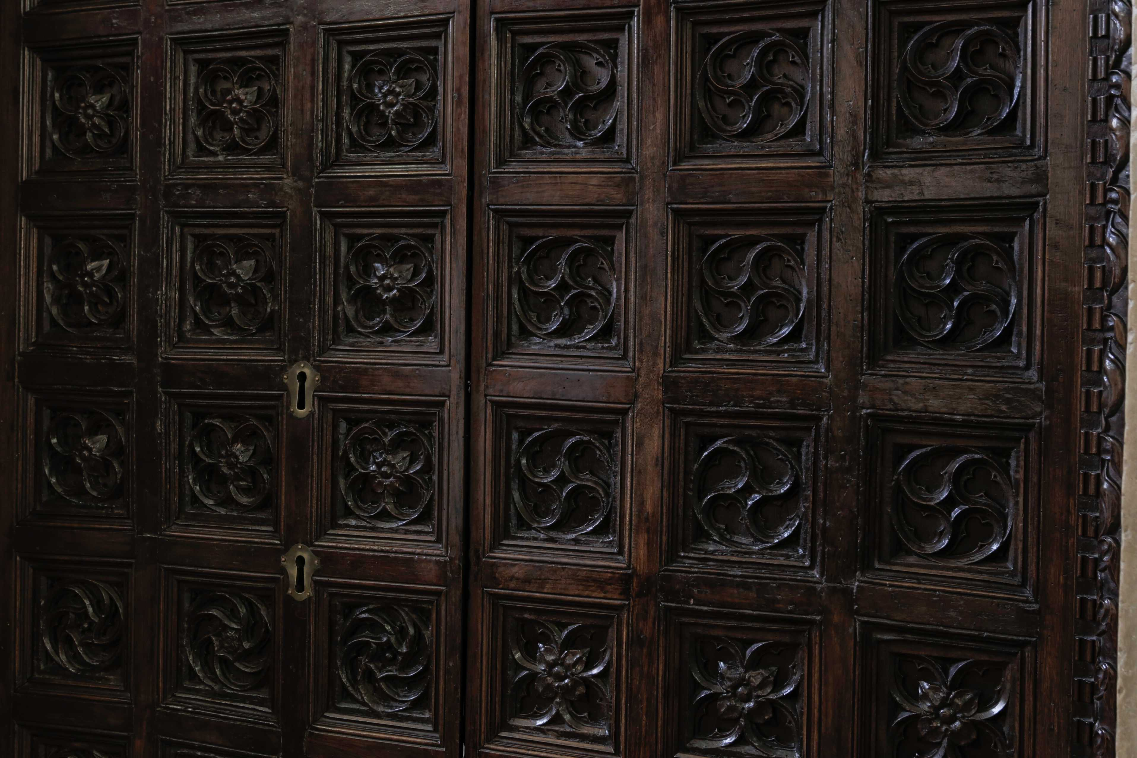 Biblioteca Malatestiana This is a photo of a monument which is part of cultural heritage of Italy.